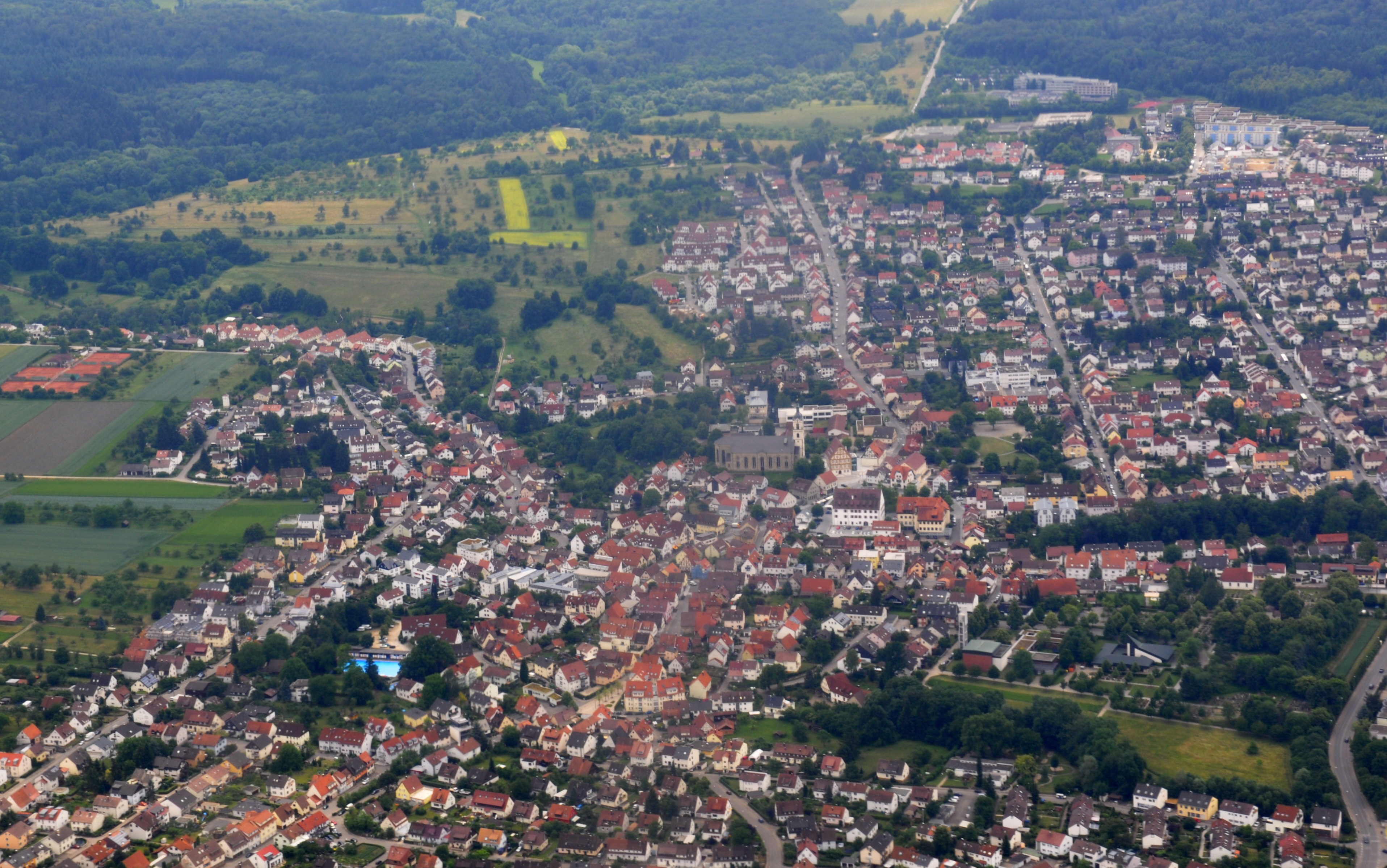 Neuhausen auf den Fildern, Luftbild